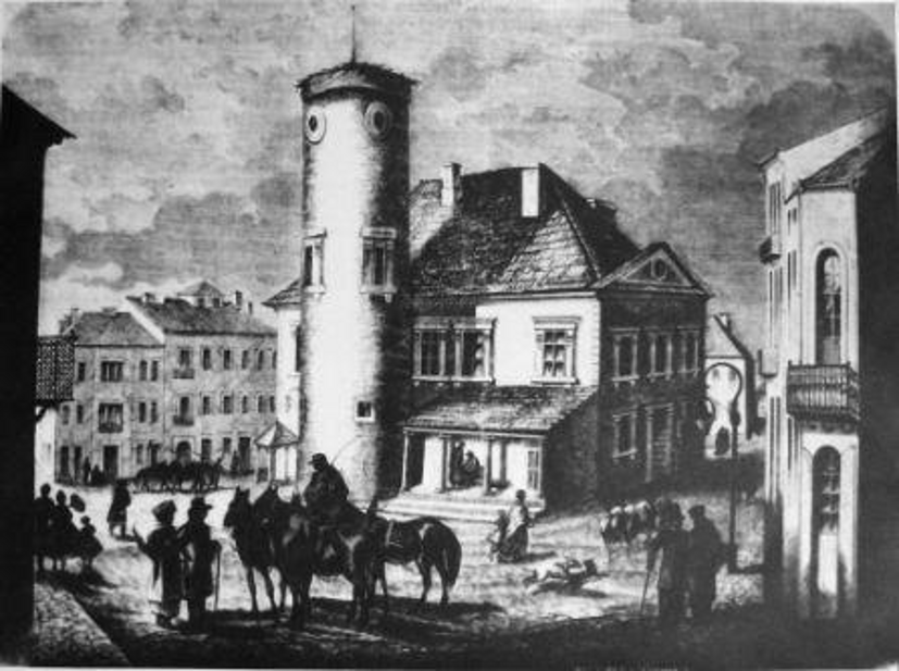 Piotrków, ehemaliges Krontribunal